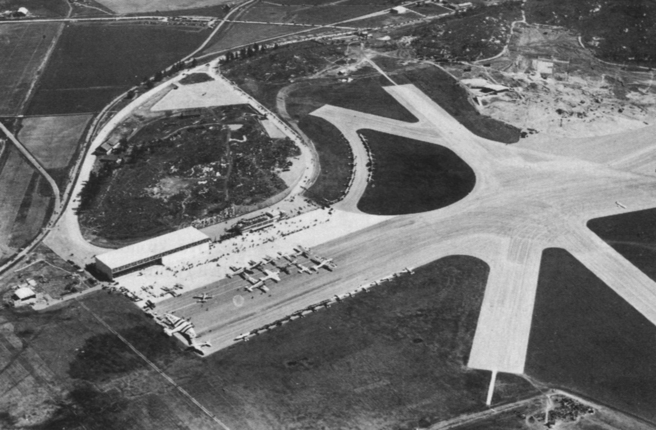 Invigning av Bromma Flygplats, världens största landflygplan, en Junkers G-38 visades upp, maskinen står startklar.